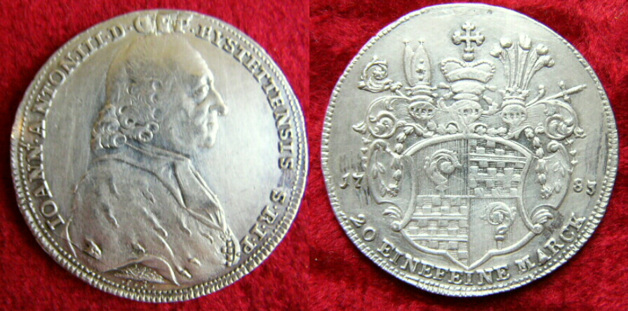 Silbermünze des Eichstätter Fürstbischofs Johann Anton III. von Zehmen, halber Taler von 1785